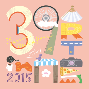 このロゴはデザイナーの古山菜摘さんにデザインしていただきました。今回参加していただいた39企画が盛り込まれています。この猫ちゃんは？赤い三角は？カメラは？これはリボンかな？など色々想像しながら、向島の企画をお楽しみください。